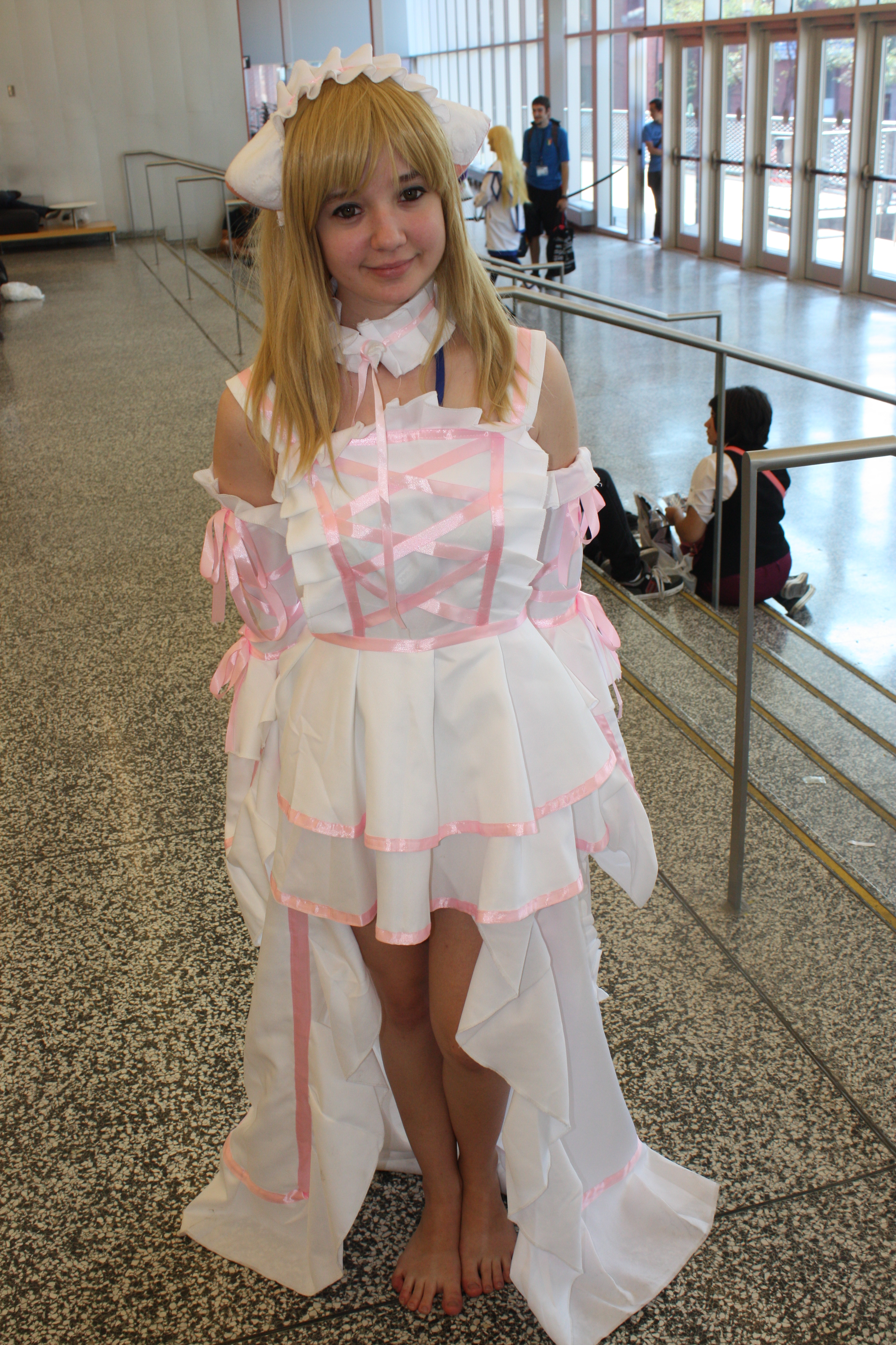 Otakuthon 2014: Chii